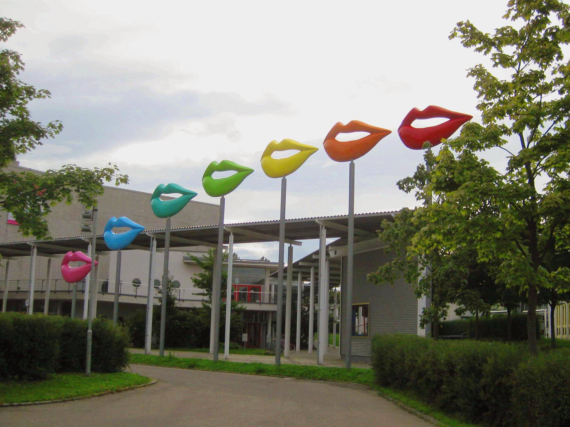 Rosalie, Im Regenbogen, 2004, - Deutschland, Baden-Württemberg, Filderstadt, Tübinger Strasse, Kultur- und Kongresszentrum FILharmonie